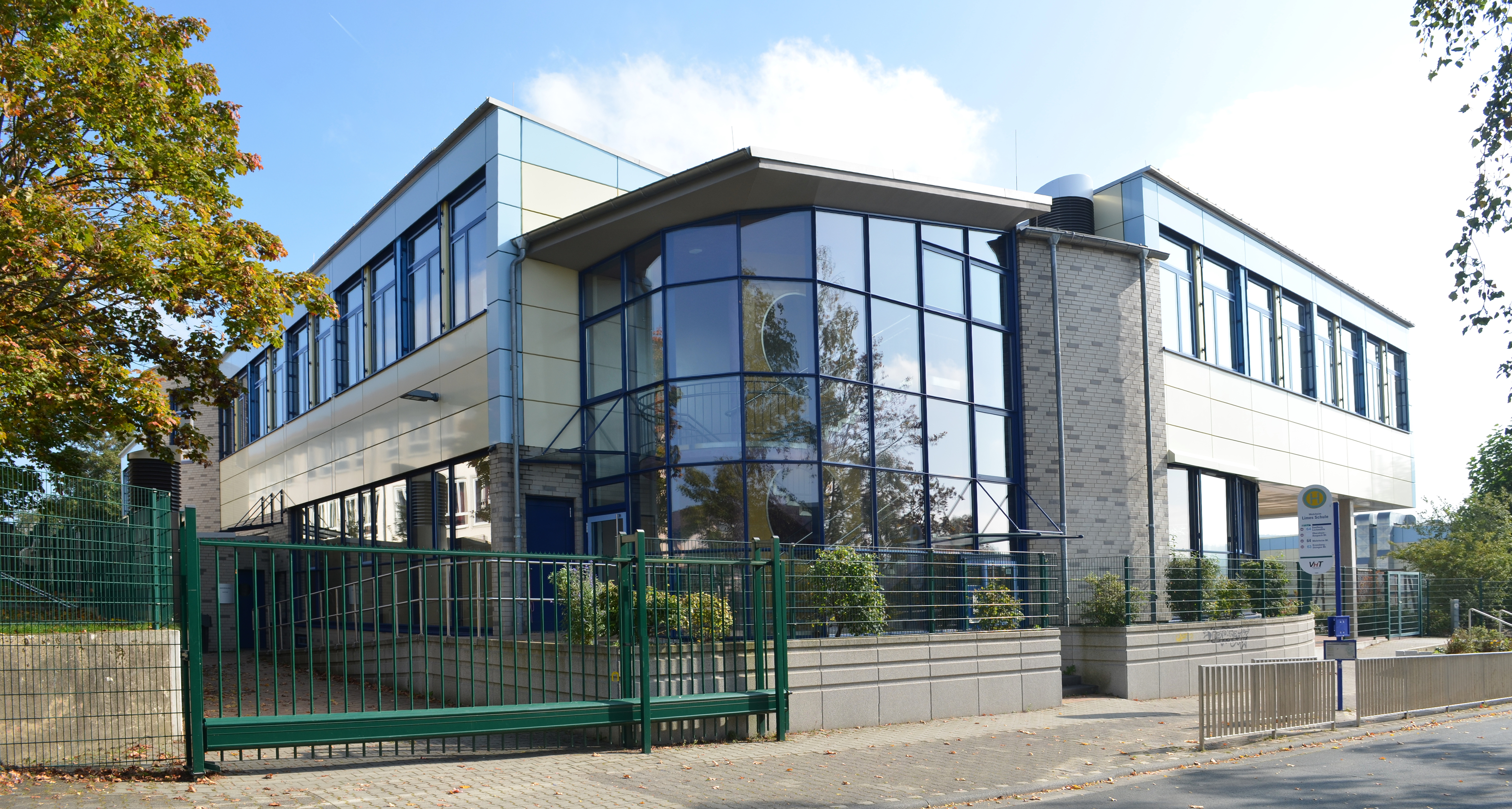 Wehrheim, Grundschule